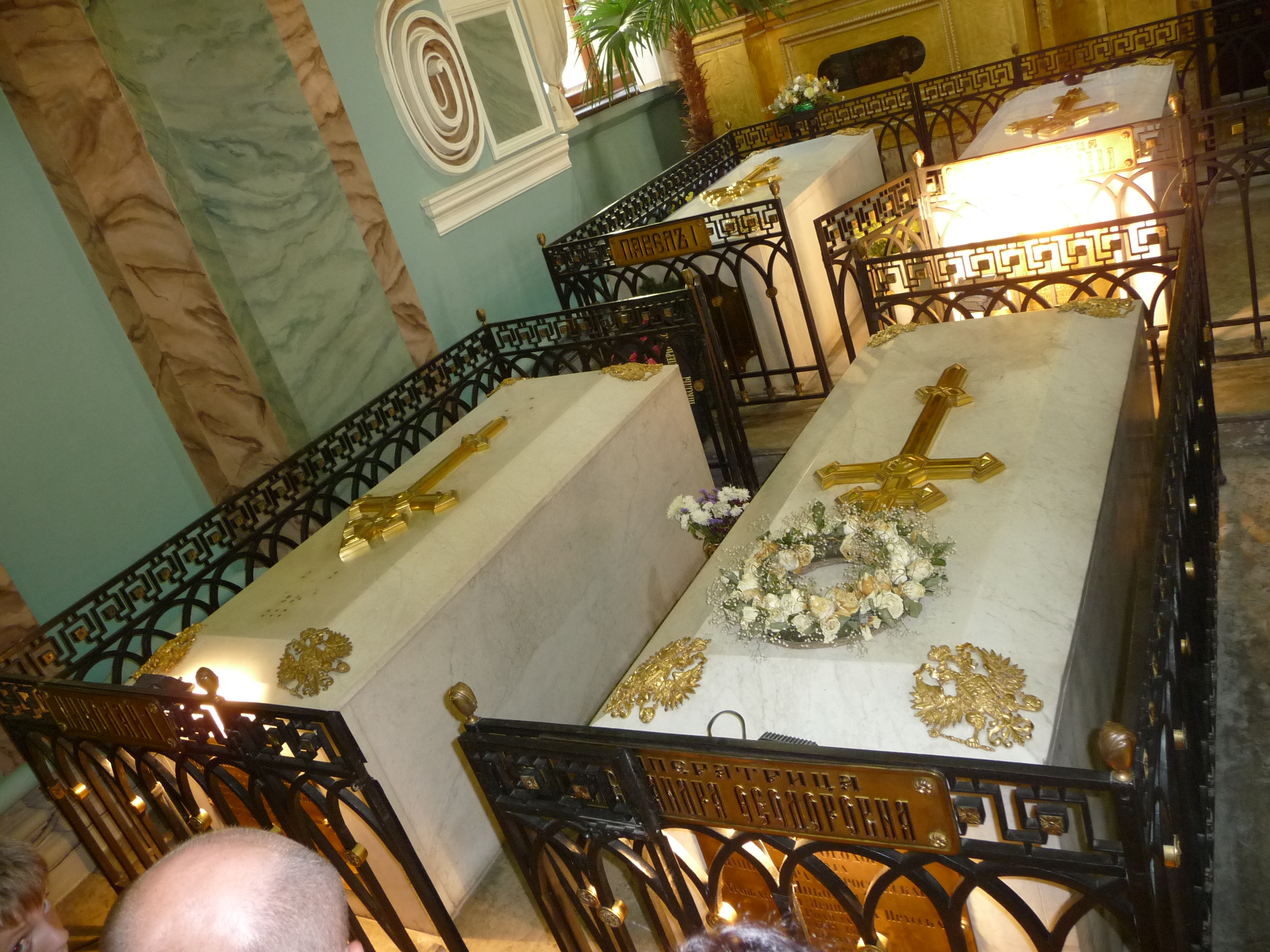 RussianTzarsTumbs-p1030592.jpg